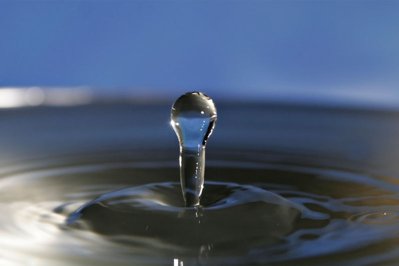 Uisce.